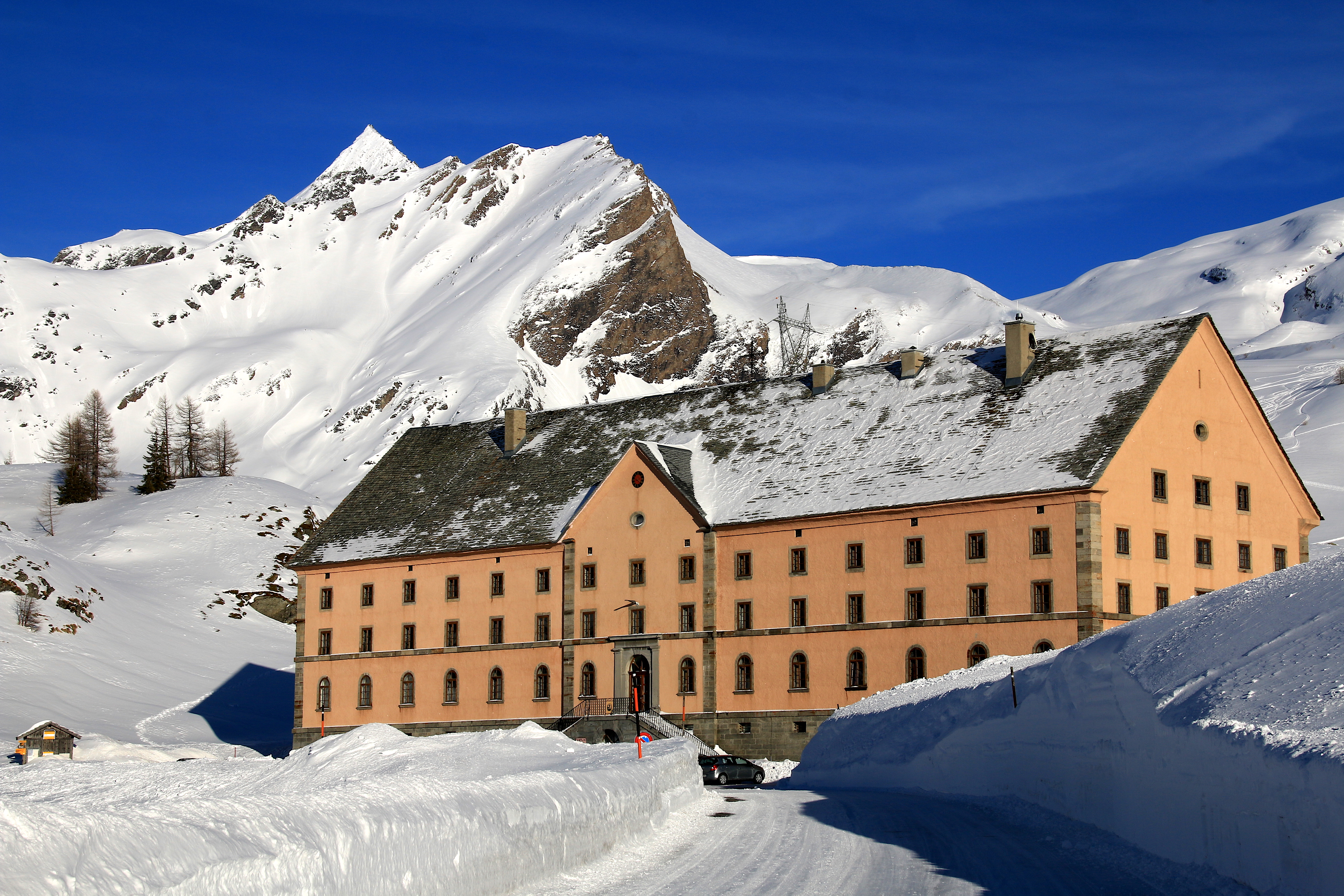 Simplon-Hospiz (2019)